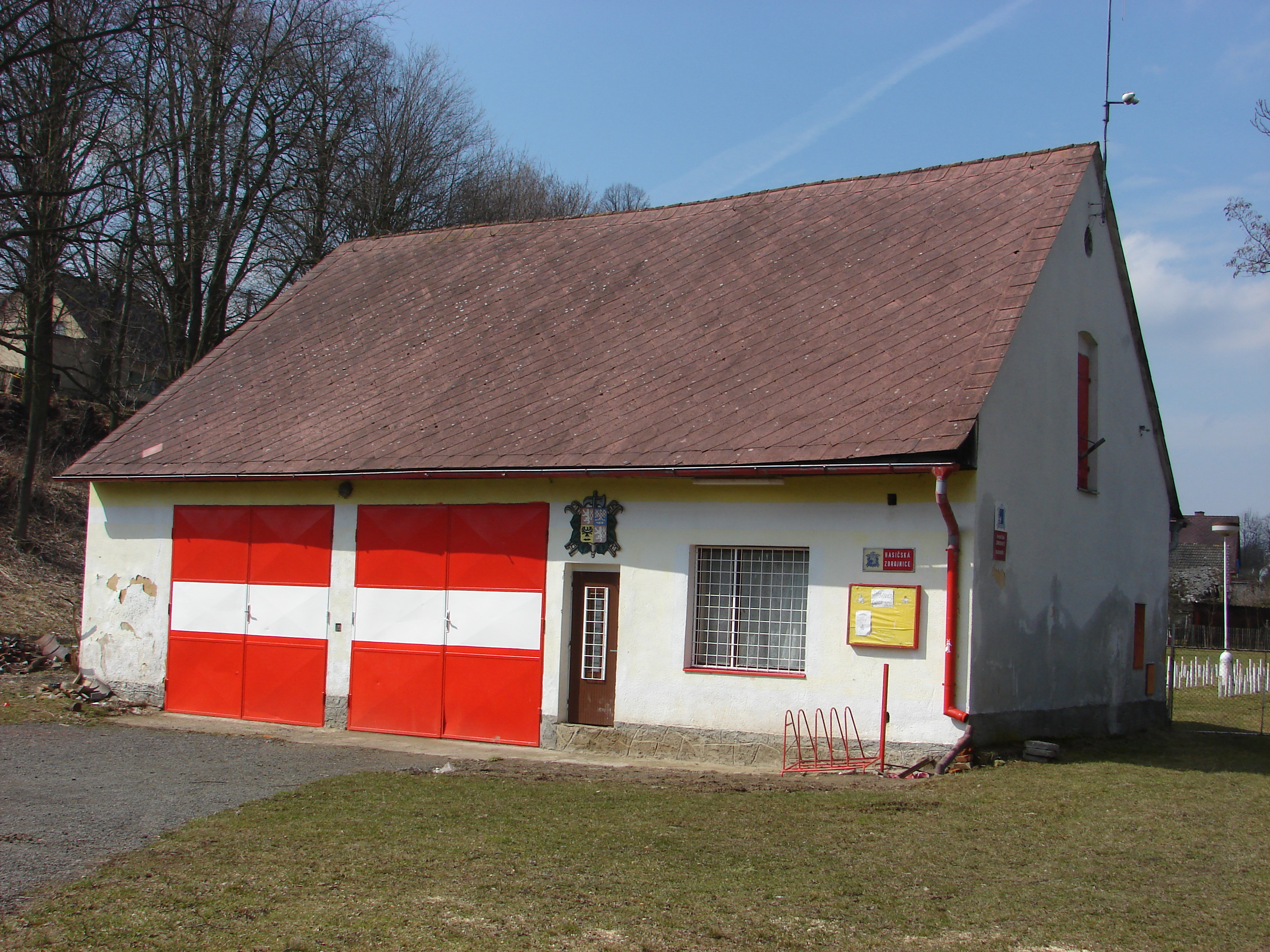 požární zbrojnice uprostřed obce